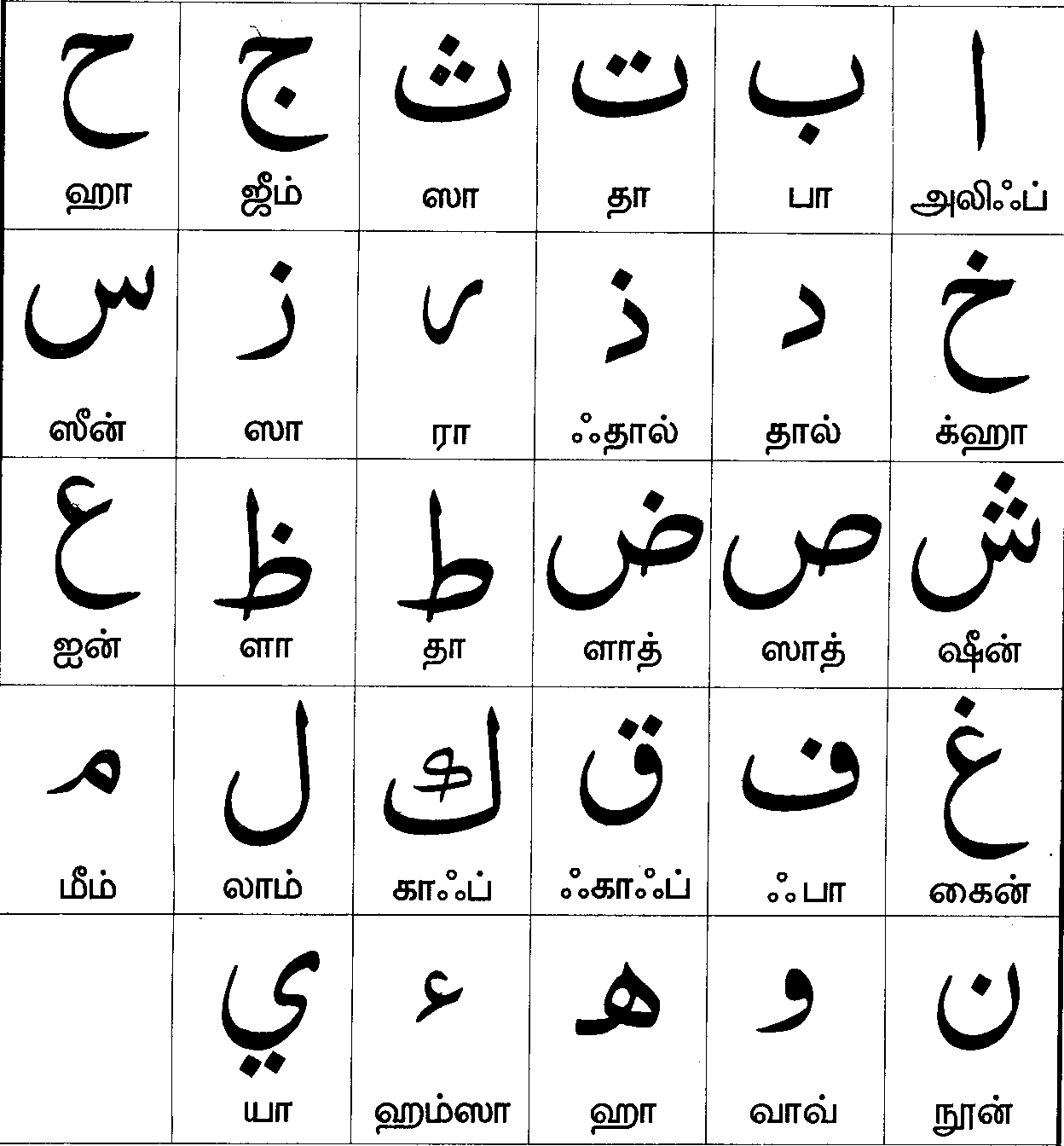 அரபு மொழி ஆப்பிரிக்க ஆசிய மொழிக் குடும்பத்தின் செமிட்டிக் கிளையின் மிகப் பெரிய மொழி.அறமைக் மொழி, ஹீப்ரு மொழி என்பவற்றுடன் தொடர்புபட்டது. இன்று 21 நாடுகளின் அரபு ஆட்சி மொழியாகும். ஐ.நா-வின் அதிகாரபூர்வ மொழிகளுள் ஒன்றாகவும் விளங்குகிறது. 183 மில்லியன் மக்களின் தாய்மொழியாக அரபு மொழி இருக்கிறது.[6] இஸ்லாமிய சமயத்துடன் தொடர்புபட்டதாகையால் உலகெங்குமுள்ள முஸ்லிம்களால் கற்கப்படுகிறது. வலமிருந்து இடமாக எழுதப்படுகிறது. அல்ஜீரியா, பாரேன், எகிப்து, எரித்திரியா, ஈராக், ஜோர்தான், குவைத், லெபனான், லிபியா, ஓமான், கட்டார், சவுதி அரேபியா, சூடான், சிரியா, யேமன் போன்ற நாடுகளில் பேசப்படுவதோடு அரசு ஏற்புடைய மொழியாகவும் உள்ளது. அரபு நாட்டில் வாழும் அந்நிய இனத்தினர் பலர் அரபு மொழியை தாய்மொழியாகவும் பேசும் மொழியாகவும் கொண்டிருக்கின்றனர். அரபு மொழி பல மொழிகளுக்கு தன் சொற்களை கொடை அளைத்துள்ளது. அவற்றில் பாரசீக மொழி, துருக்கியம், சோமாலி, போசுனியன், வங்காளி, உருது, இந்தி, மலாய், அவுசா போன்றவை அடங்கும். அதே சமயம் அரபு மொழிக்கும் மற்ற மொழிகள் சொற்கொடை வழங்கியுள்ளன. அவற்றுள் ஹீப்ரு, கிரேக்கம், பாரசீகம், சிரியக்கு போன்ற மொழிகளும் அடங்கும்.